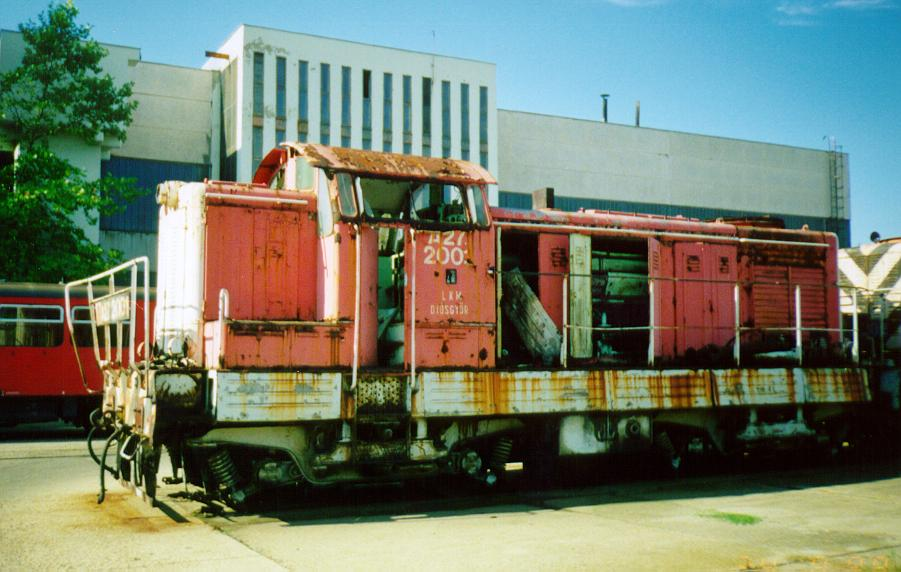 Ipari pályaszámozás szerint A27-es, MÁV pályaszámozás szerint M46-os sorozatú dízelmozdony.